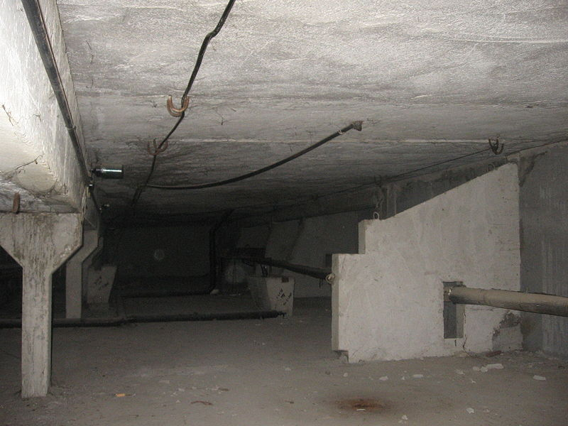 Namo technologinis aukštas 01